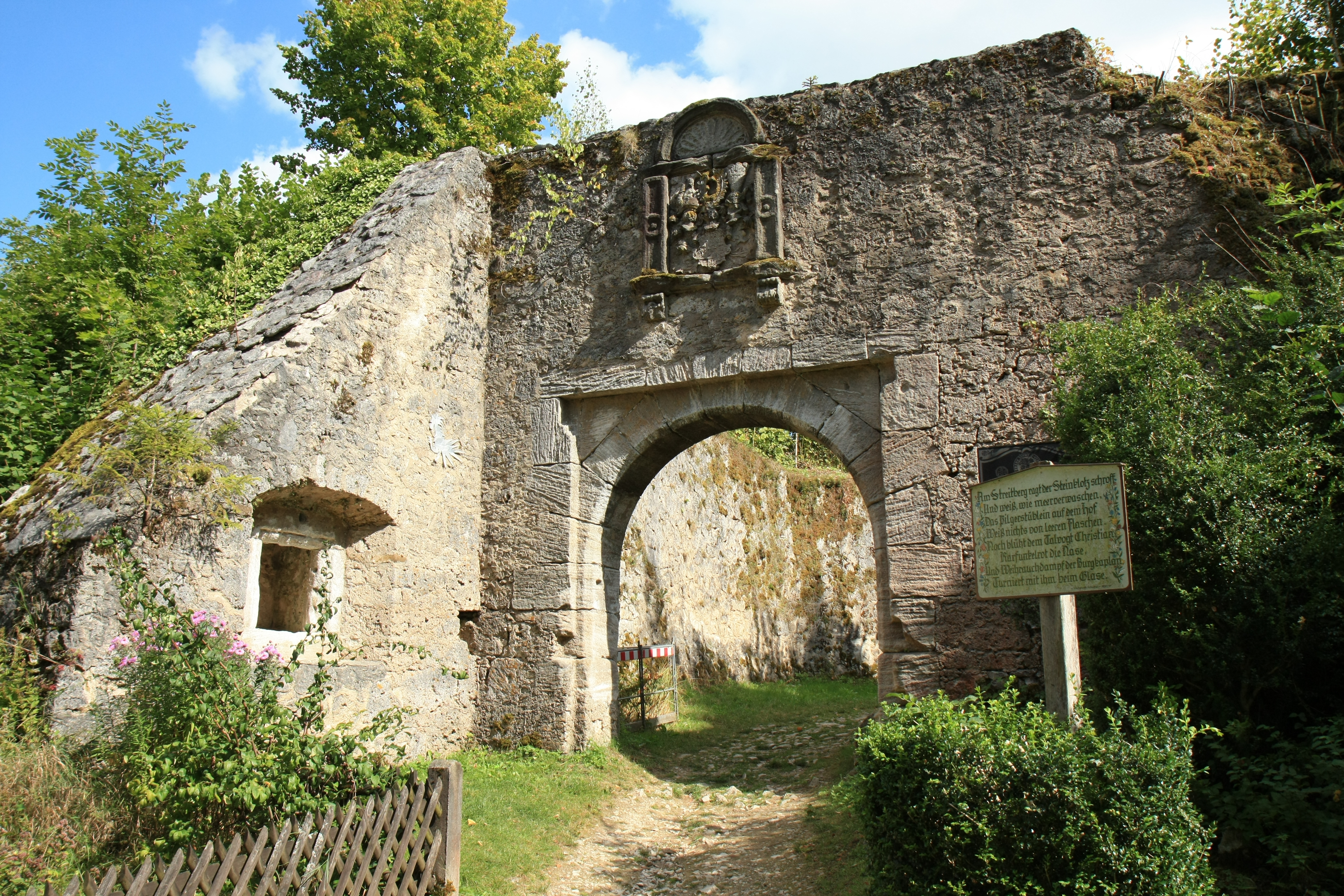 Äusseres Tor der Burgruine Streitberg